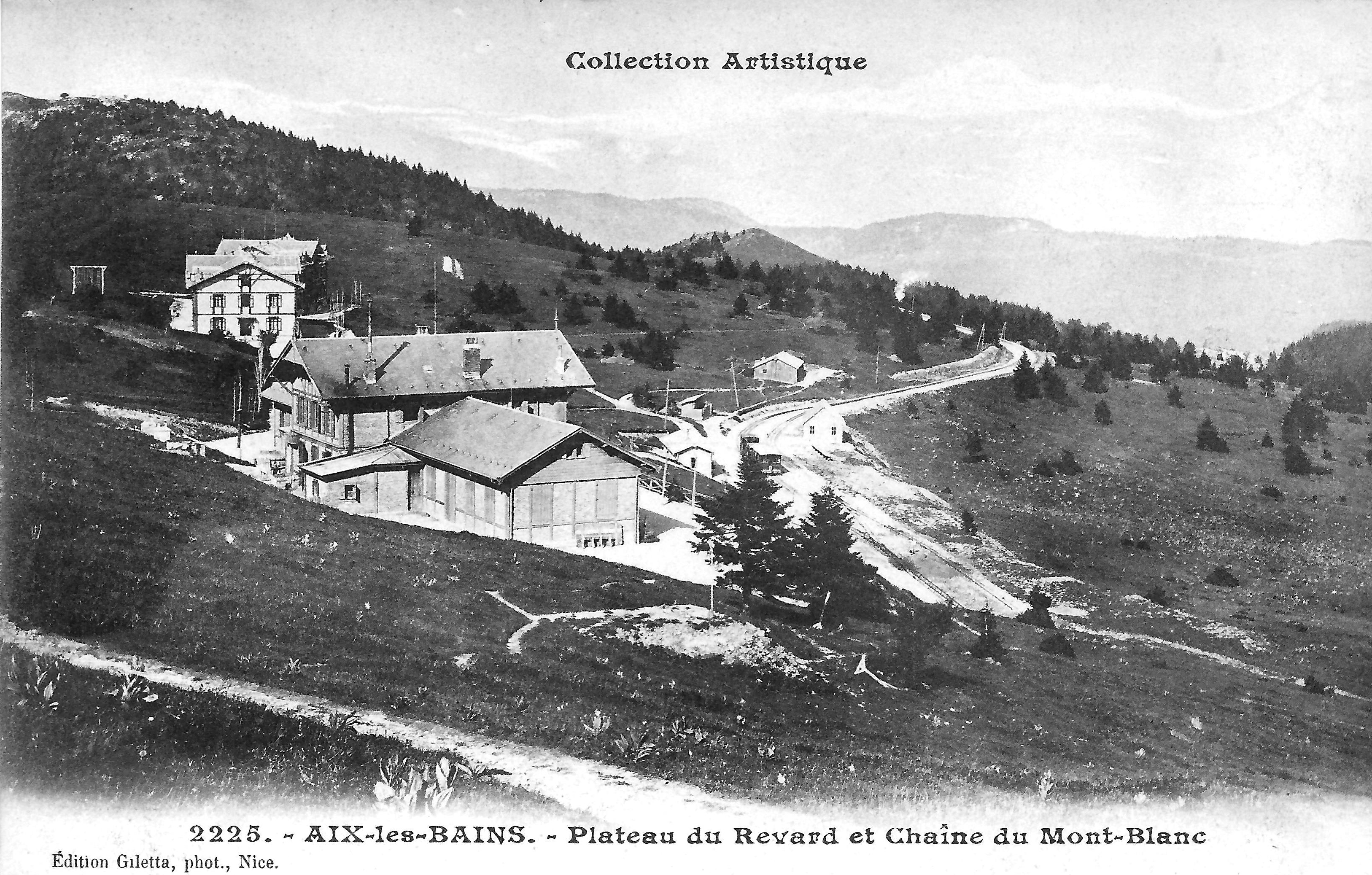 Carte postale d'une station dans sur le Plateau du Revard